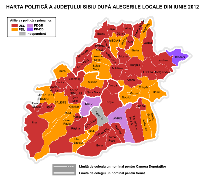 Sibiu 2012 alegeri locale .